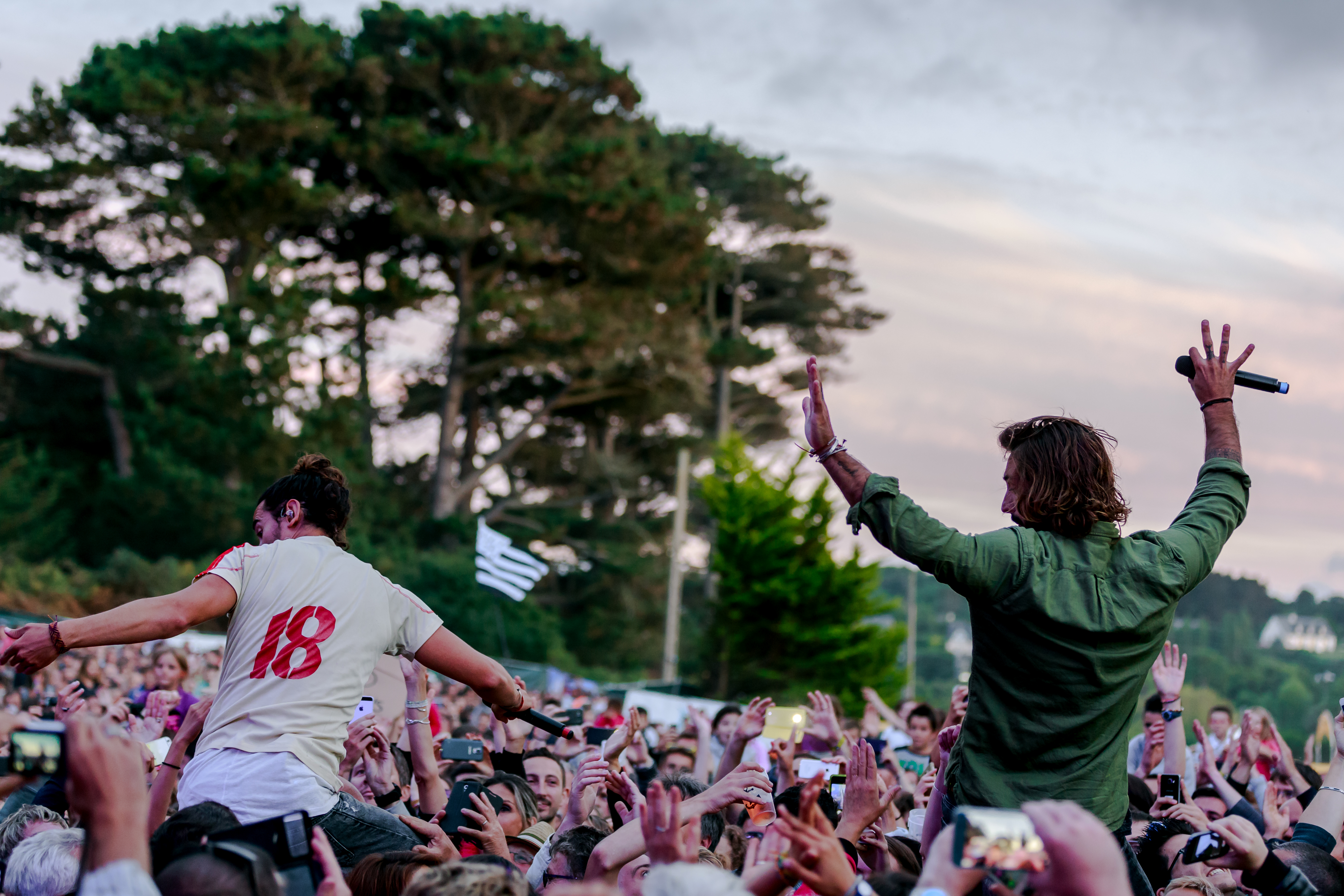 Fréro Delavega en concert au festival de Buguélès à Penvénan (22) le 30 juillet 2016.